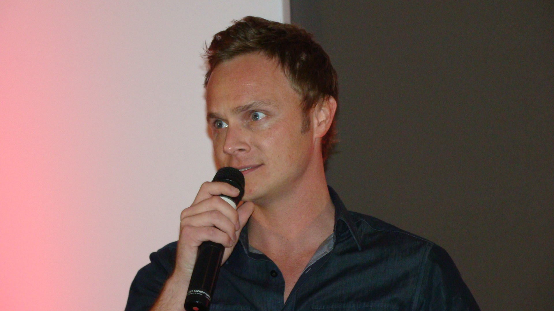 David Anders